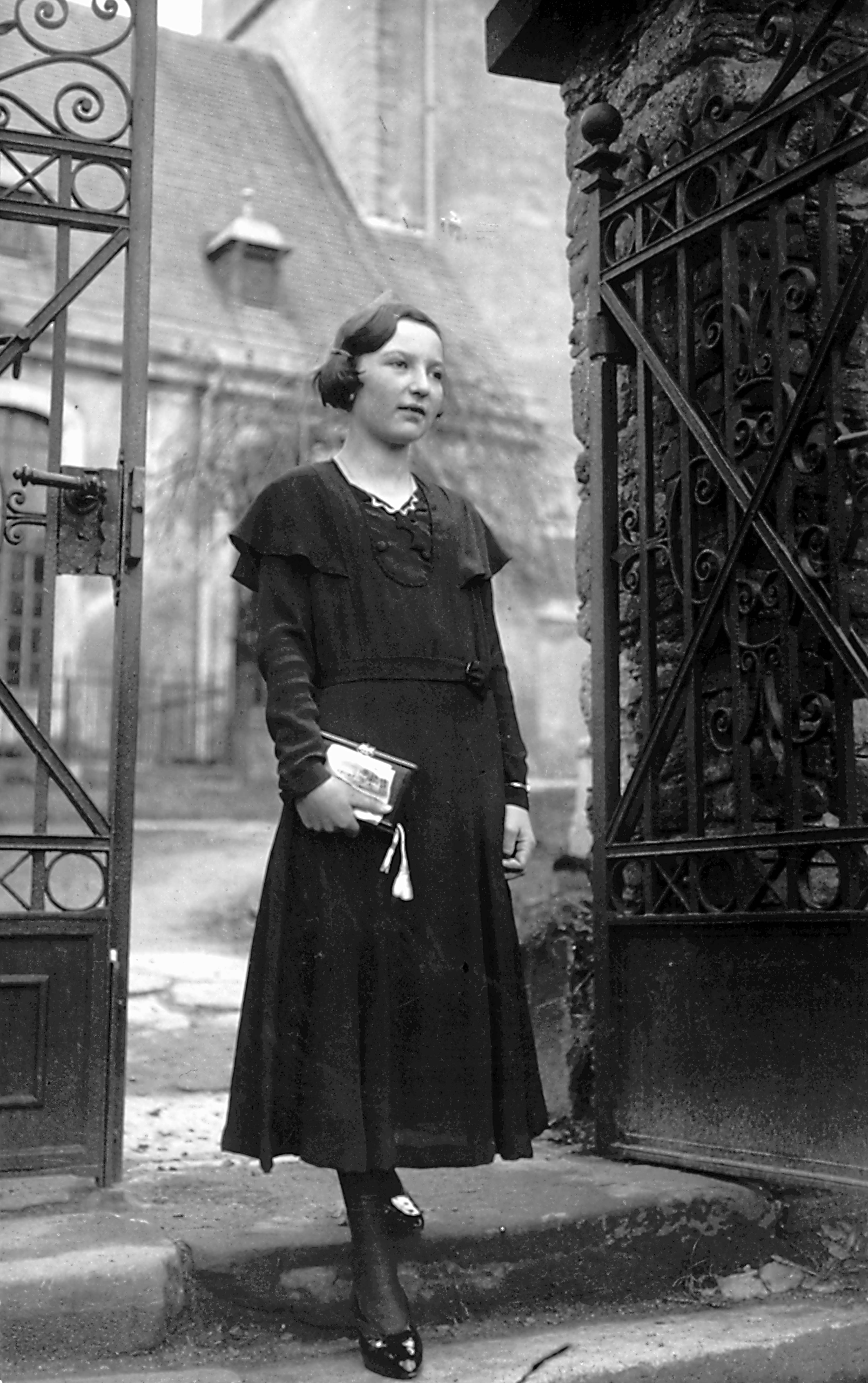 09.04.1933 Palmsonntag: Hilbersdorf bei Freiberg/Sa.: Konfirmandin vor der Dorfkirche (GMP: 50.910975,13.392068) Hilbersdorf.